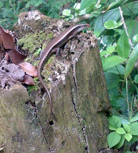 Mabuya multifasciata in Phang Nga, Thailand